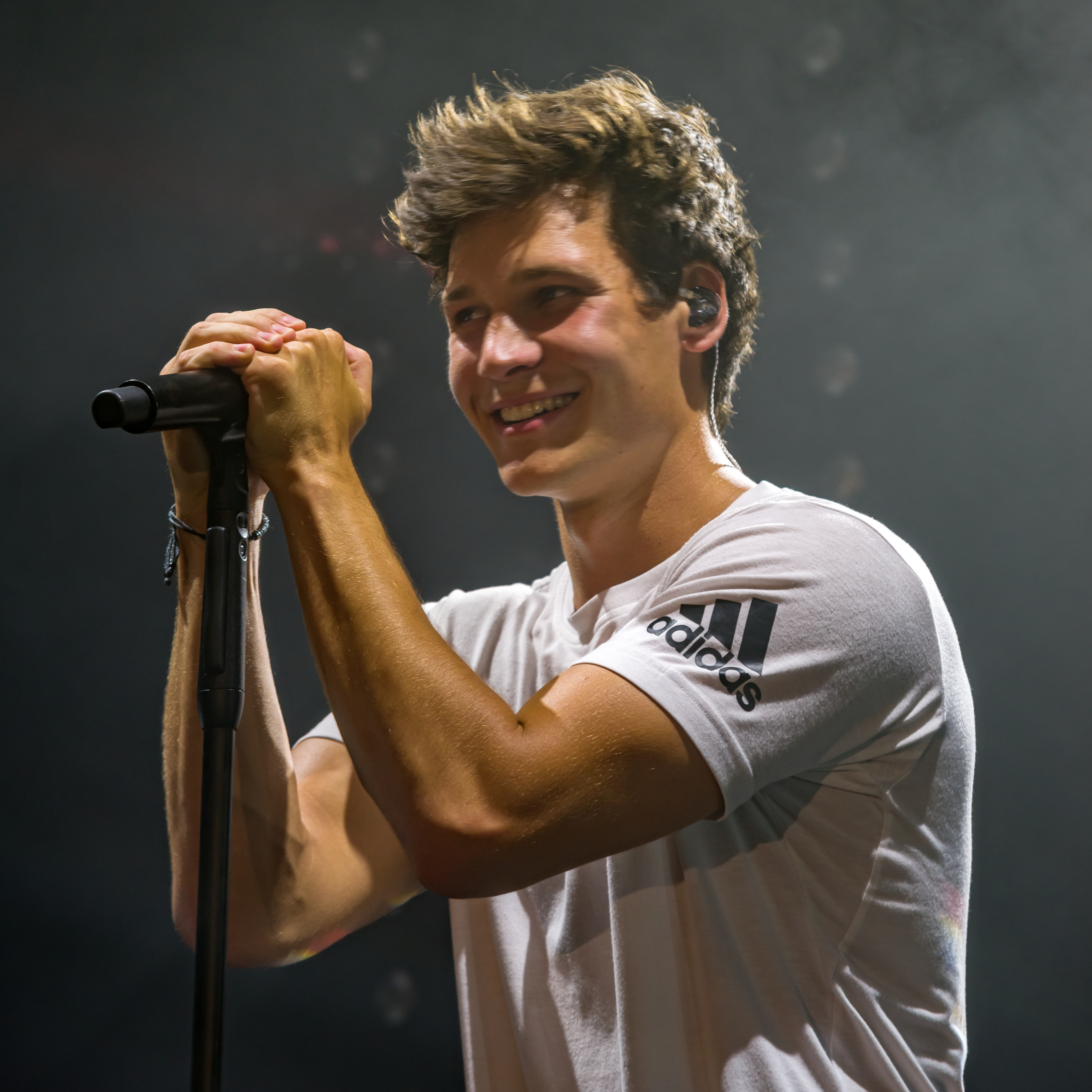 Bilder vom Zelt Musik Festival 2018 in Freiburg im Breisgau Auftritt Wincent Weiss am 23. Juli 2018 im Zirkuszelt